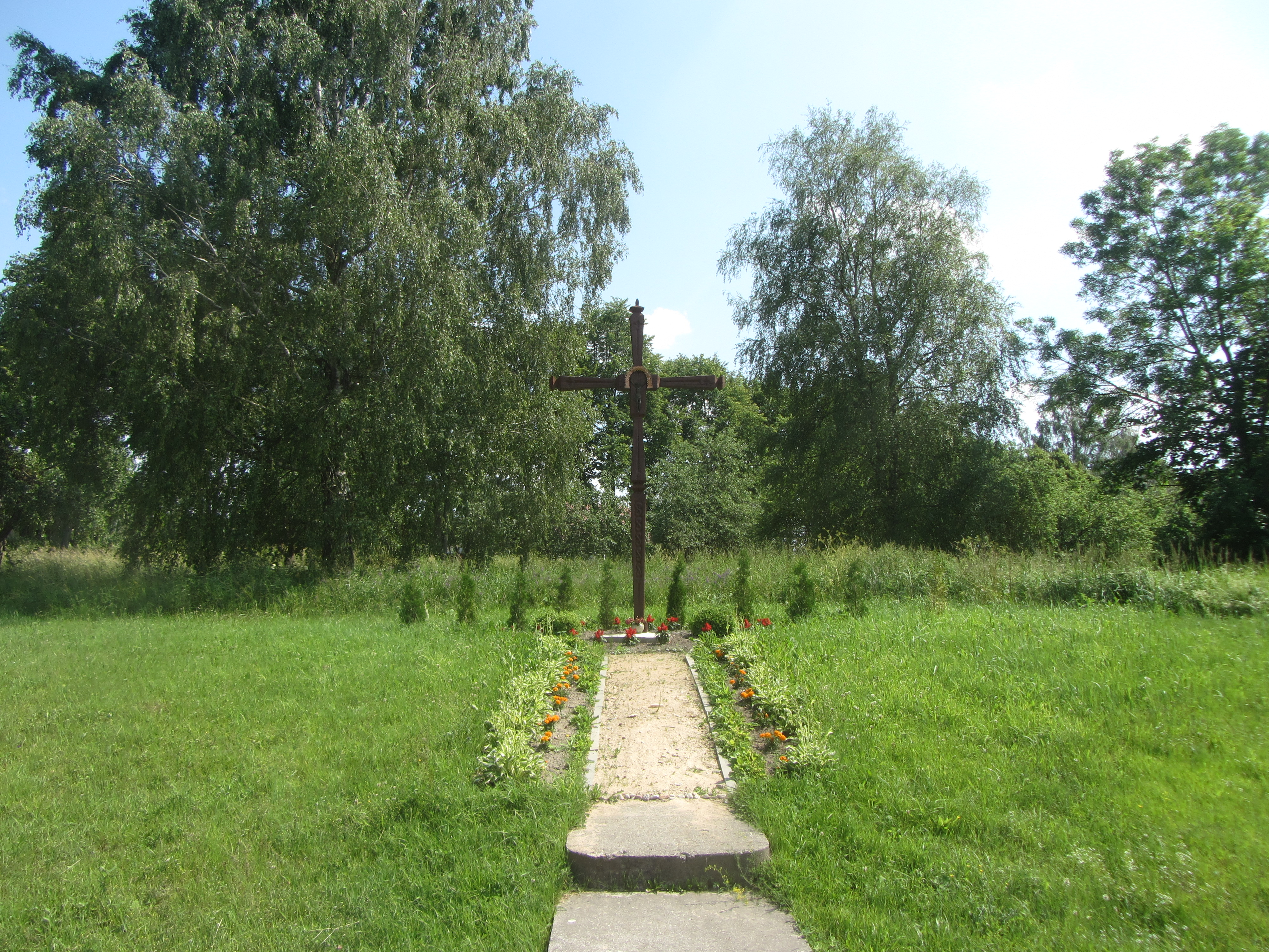 Verstaminai 67412, Lithuania